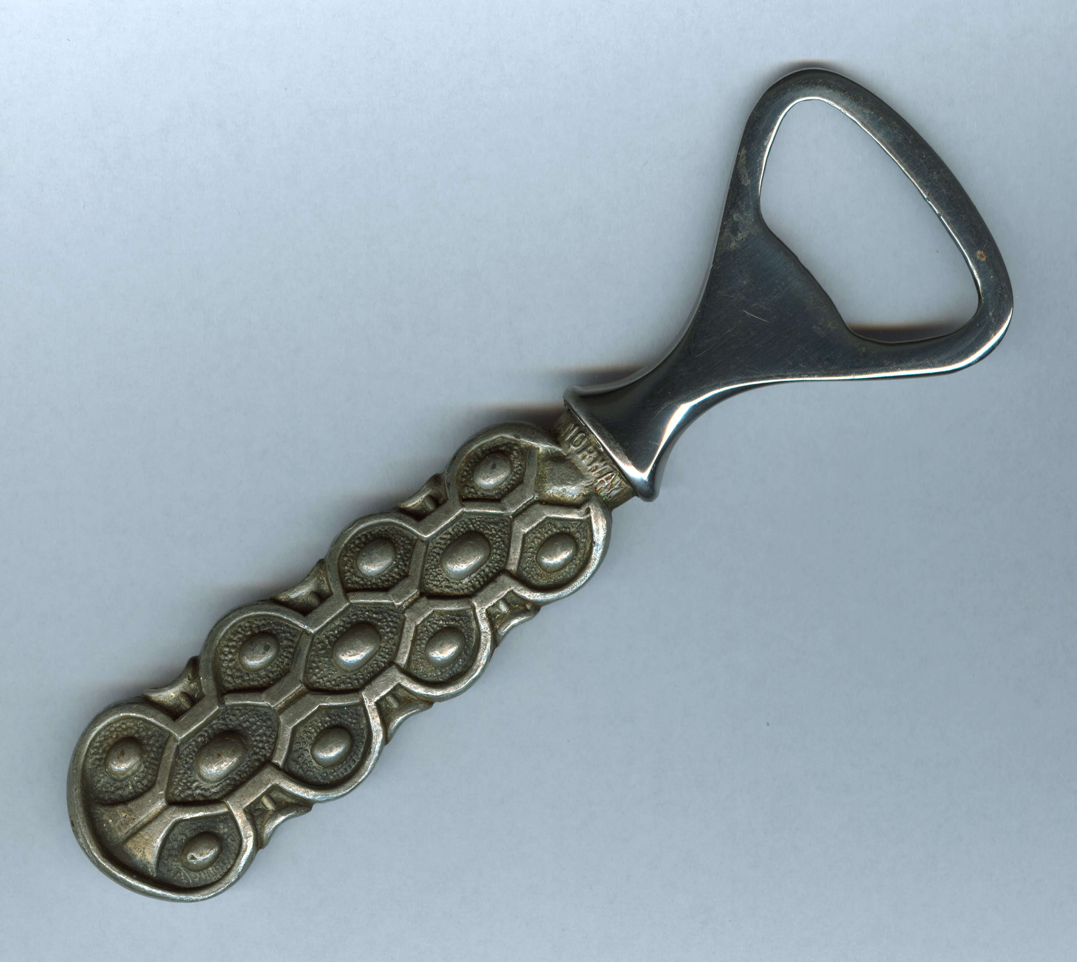 Norwegisches Zinn-Design aus den 1960er Jahren. Länge des Flaschenöffners 12 cm, Gewicht 75 g.